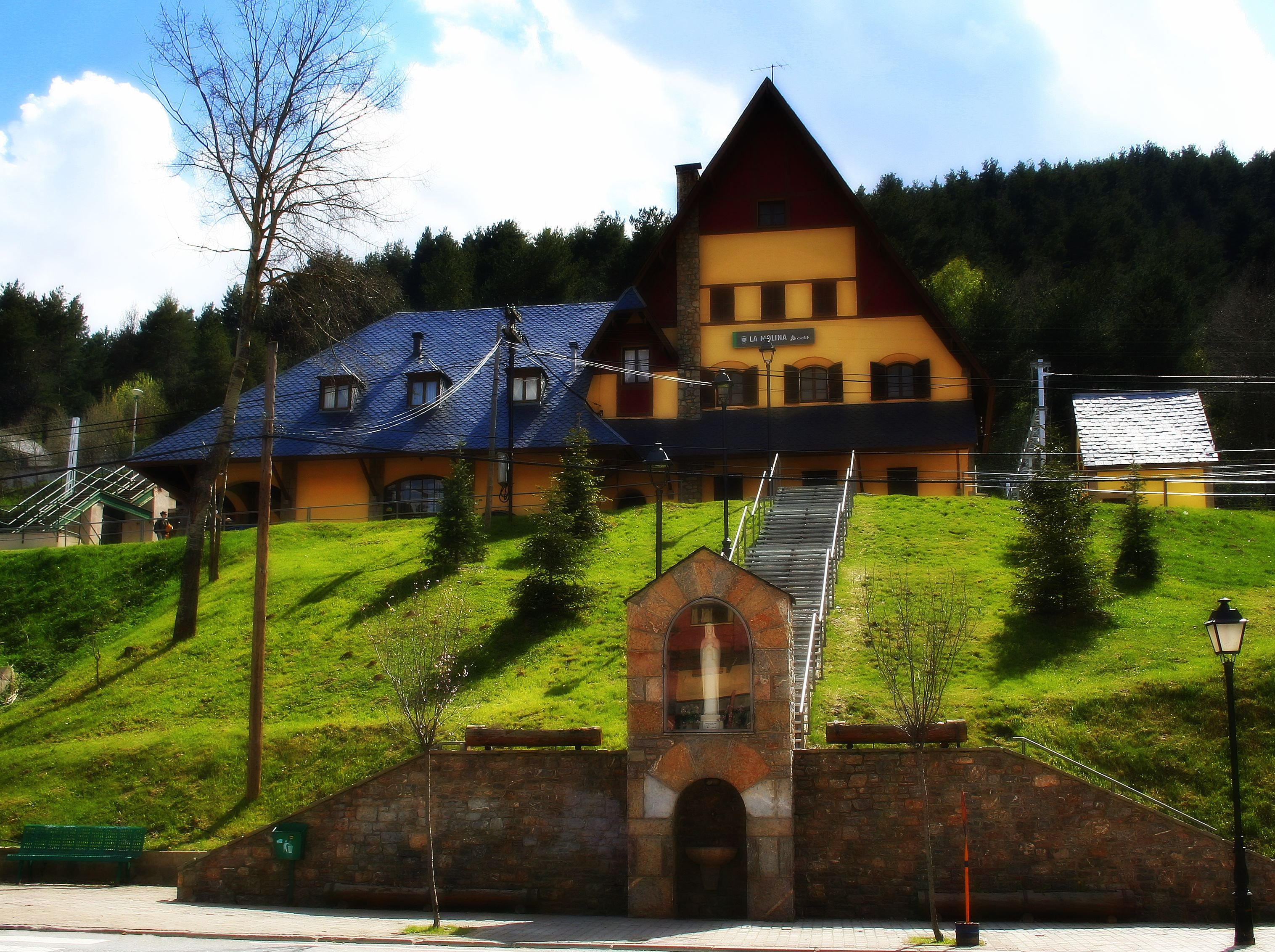 Estació de la Molina a la primavera